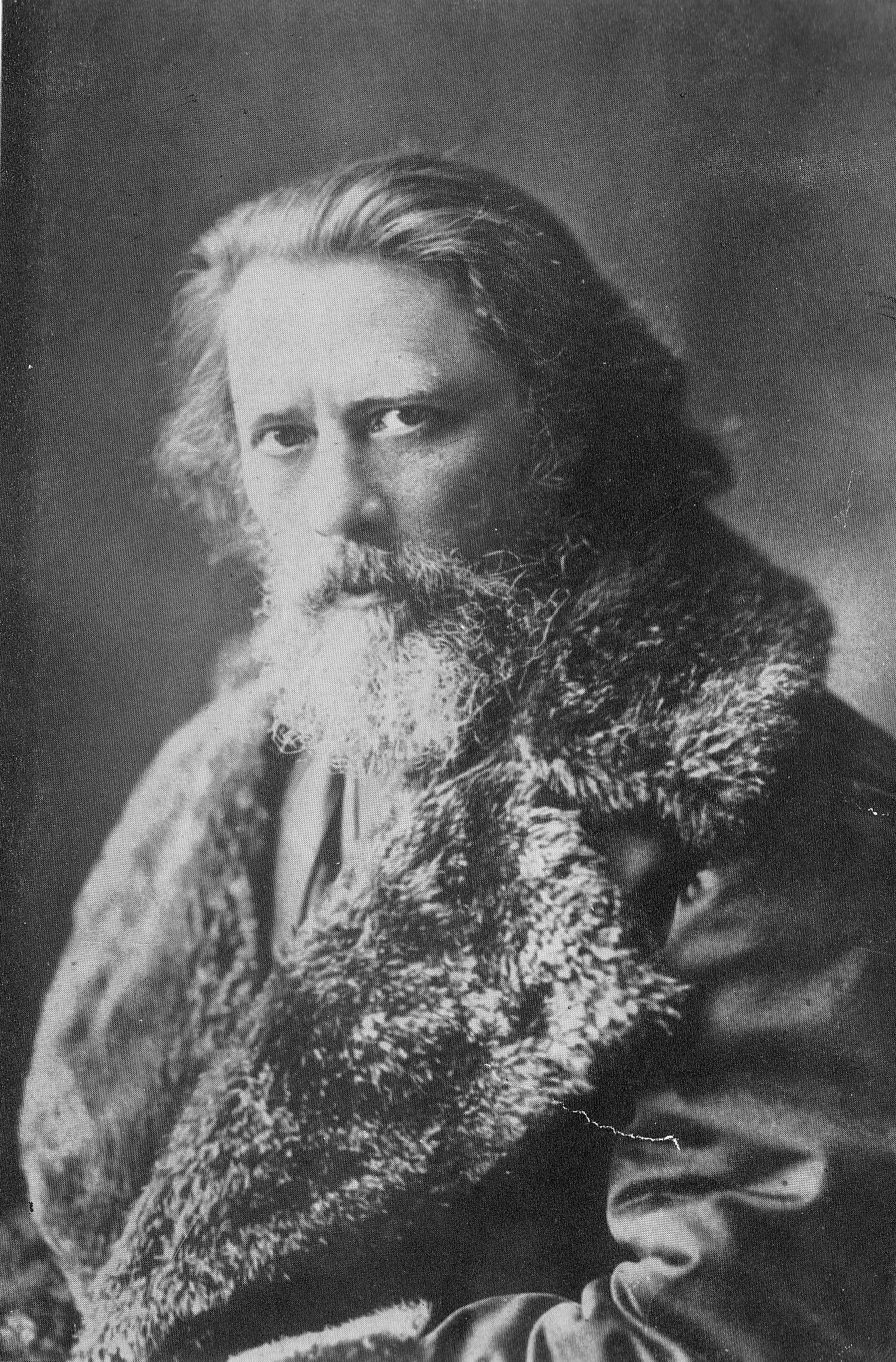 Zichy Mihály fényképe, 1881